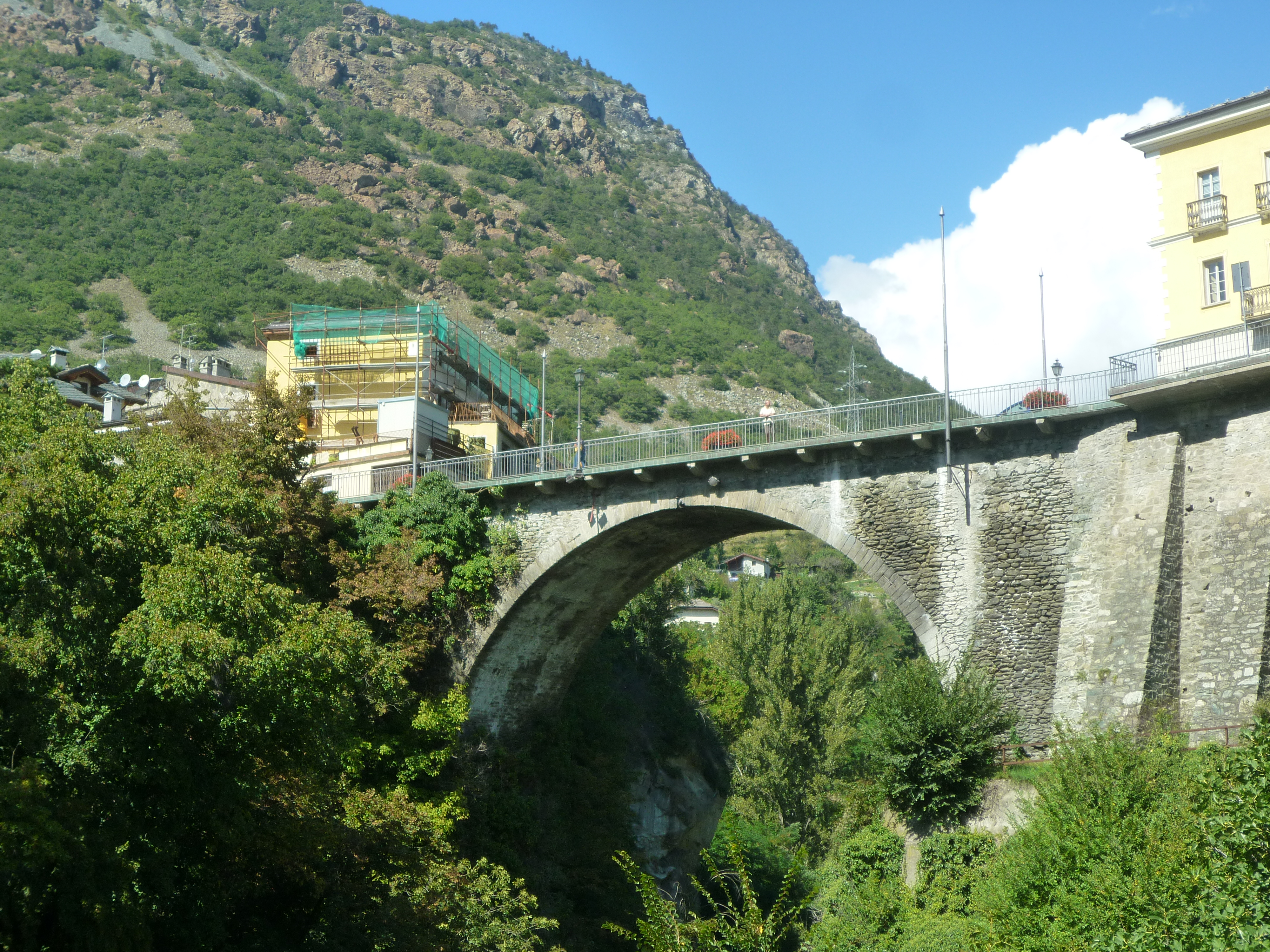 Pont neuf (Châtillon, Vallée d'Aoste)